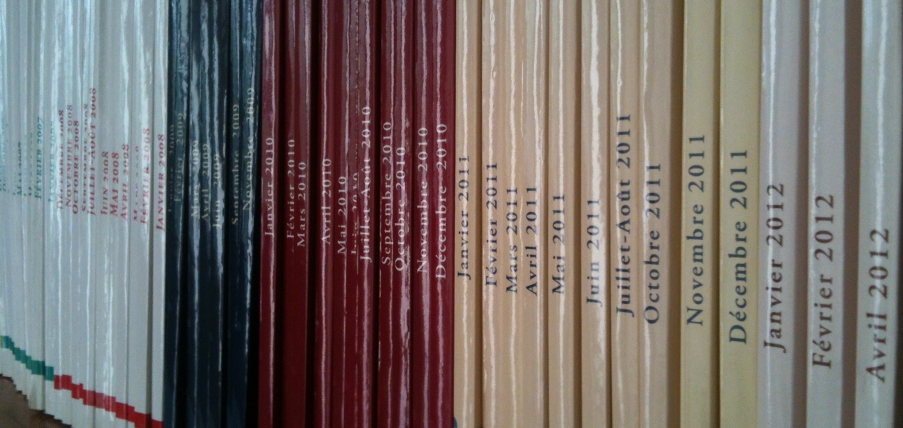 Quelques numéros récents d'Etudes